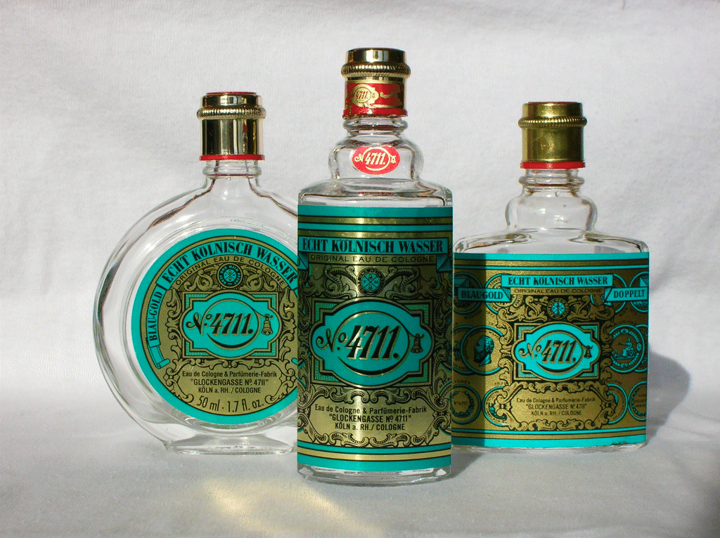 Zelf gemaakt op 3 november 2006